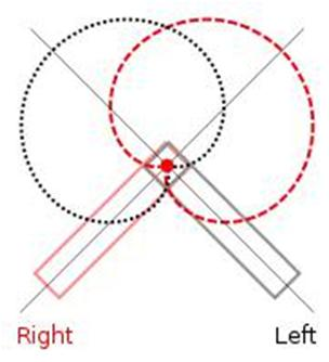 Tecnica estereofonica XY